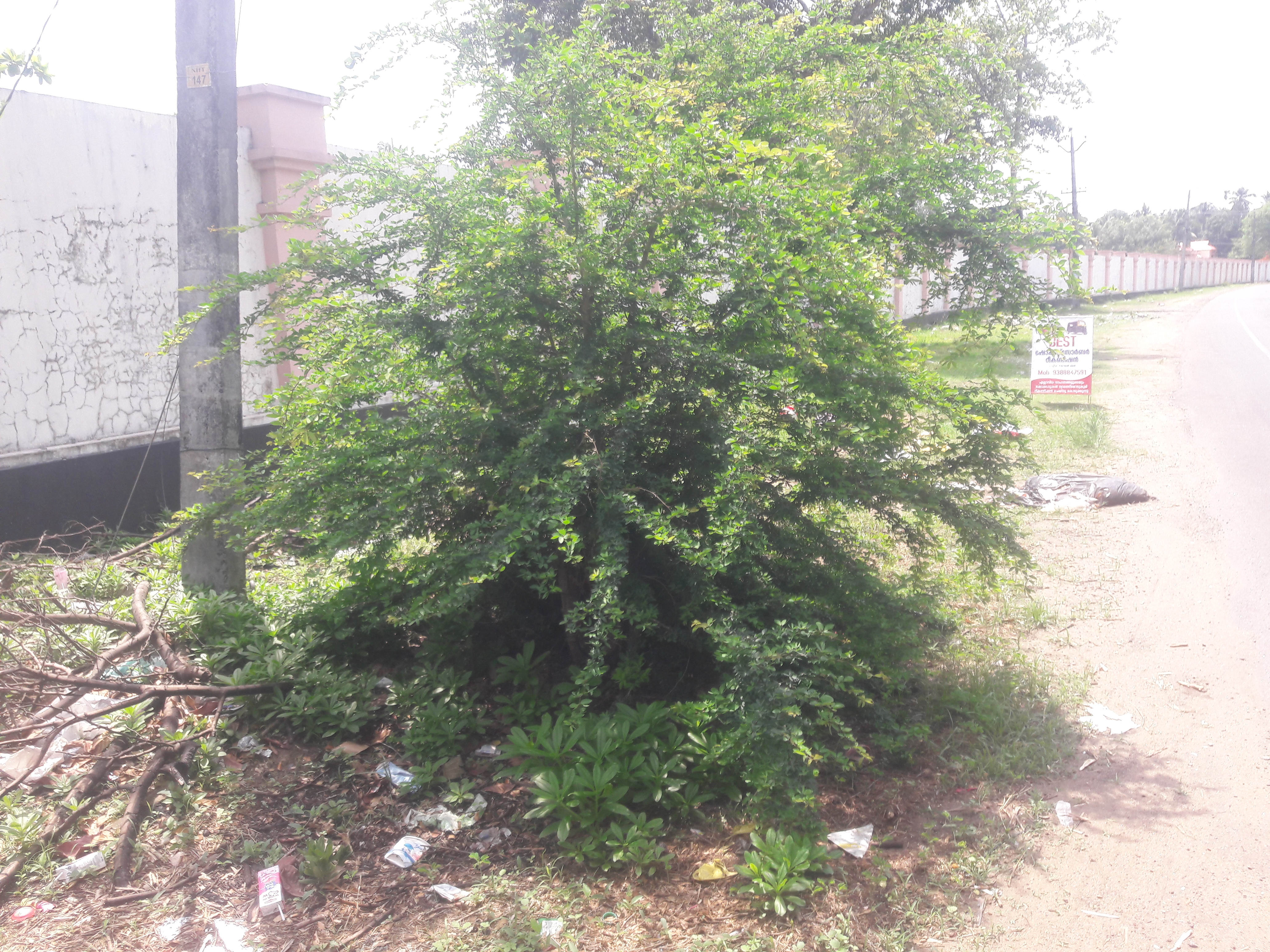 വഹ്നി ശാസ്ത്രീയ നാമം Prosopis cineraria കുടുംബം Fabaceae.